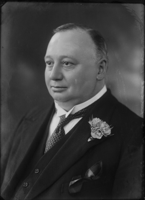 Walter Liddall